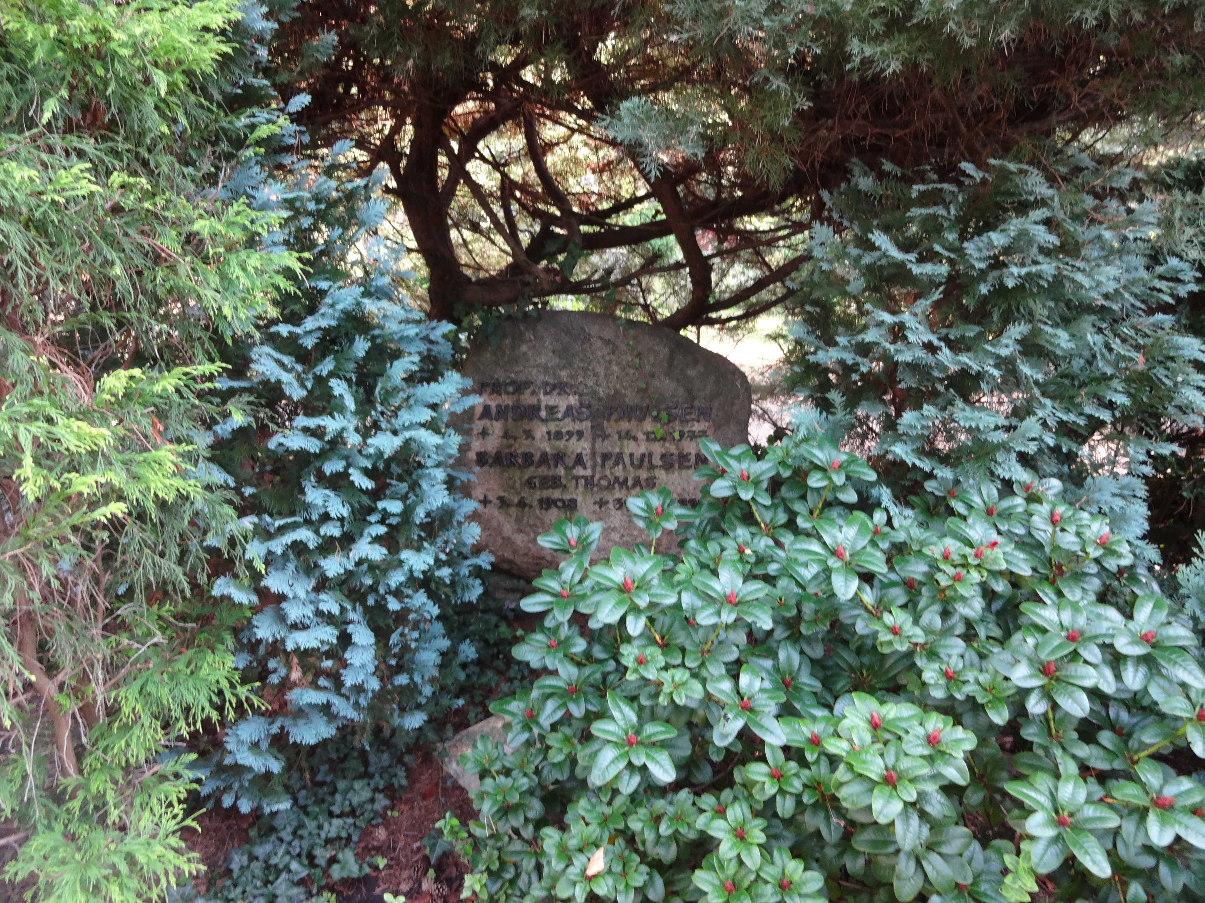 Grab von Prof. Andreas Paulsen auf dem Waldfriedhof Dahlem